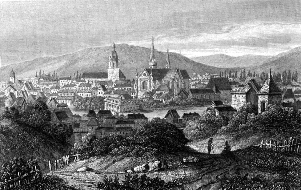 « Bar sur Aube » Image en provenance du livre : Eusèbe Girault de Saint-Fargeau, Guide pittoresque du voyageur en France, contenant la statistique et la description complète des quatre-vingt-six départements, orné de 740 vignettes et portraits gravés sur acier, de quatre-vingt-six cartes de départements et d'une grande carte routière de la France, par une Société de gens de lettres, de géographes et d'artistes, Paris, F. Didot frères, 1838, 6 volumes in-8° (BNF : 8-L25- 46). Volume III Route de Paris à Nice traversant les départements de l'Isère, des Hautes-Alpes, des Basses-Alpes et du Var. auteurs dessins : Rauch (ou autre) auteurs gravures : Skelton fils, Schroeder, Bishop (ou autre)